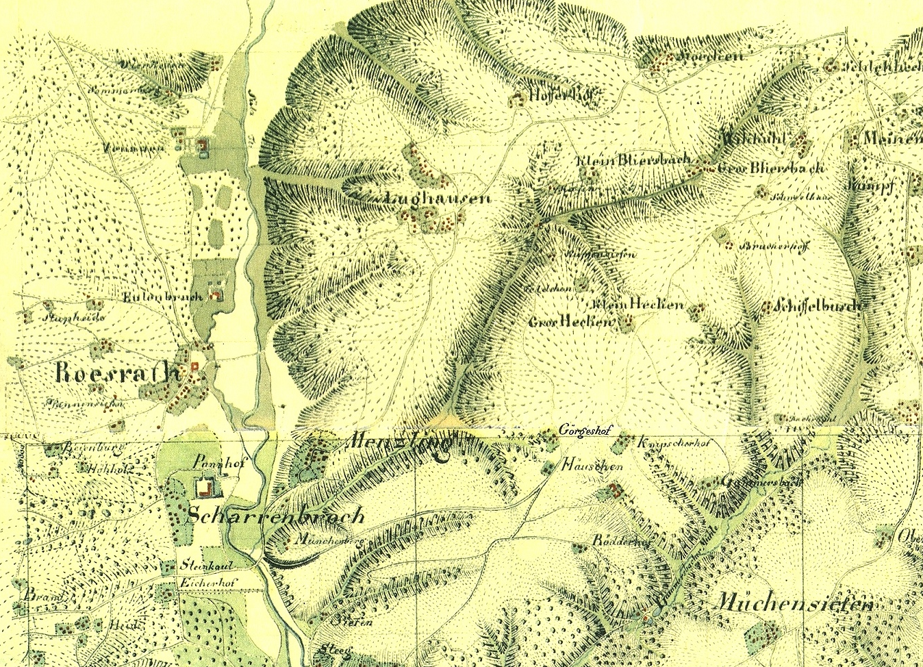 Ausschnitt aus der Tranchot-Karte Rösrath von 1817